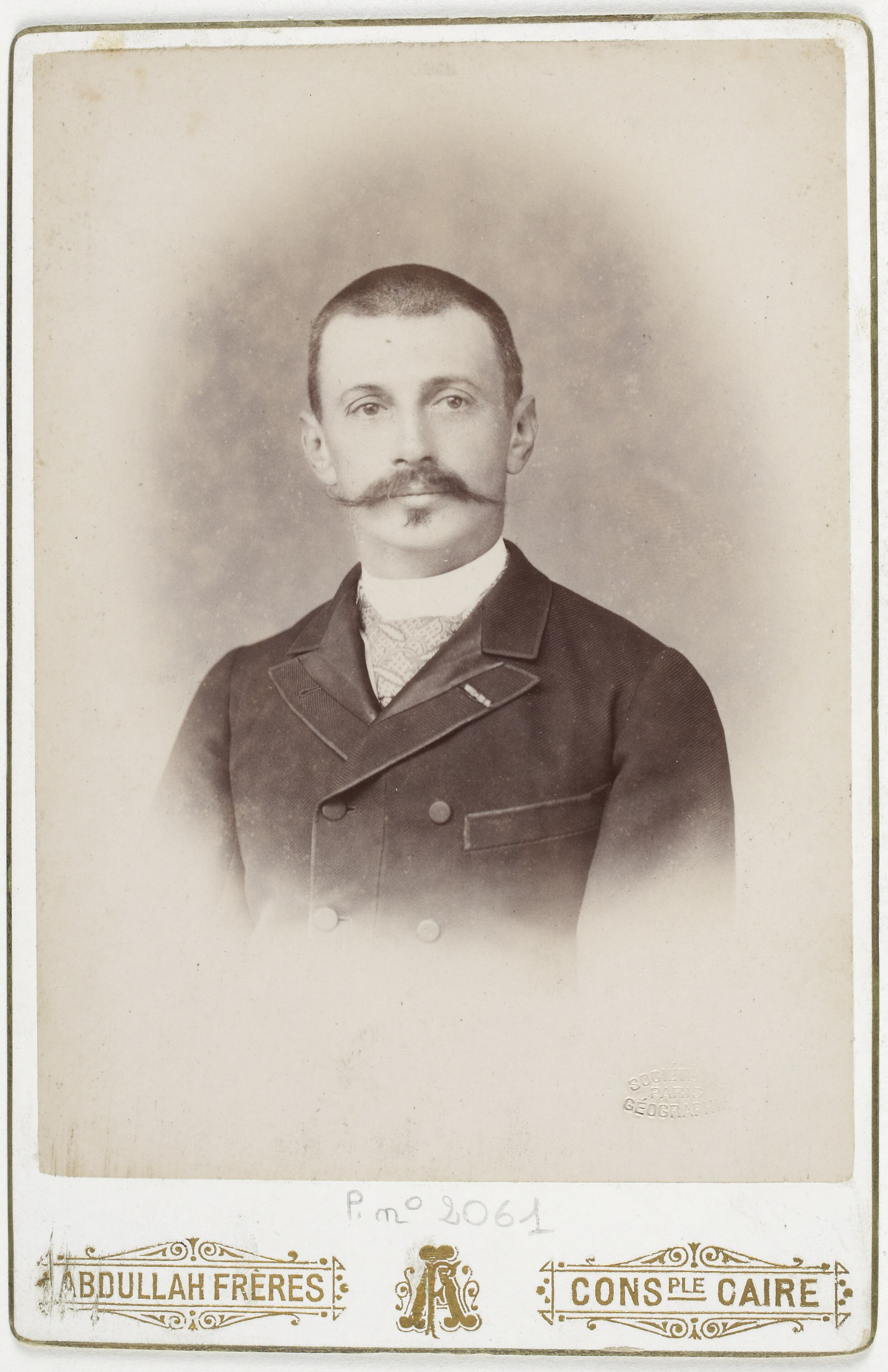 Jacques de Morgan (1857—1924)